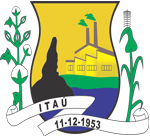 Brasão de Itaú estado do Rio Grande do Norte, Brasil.